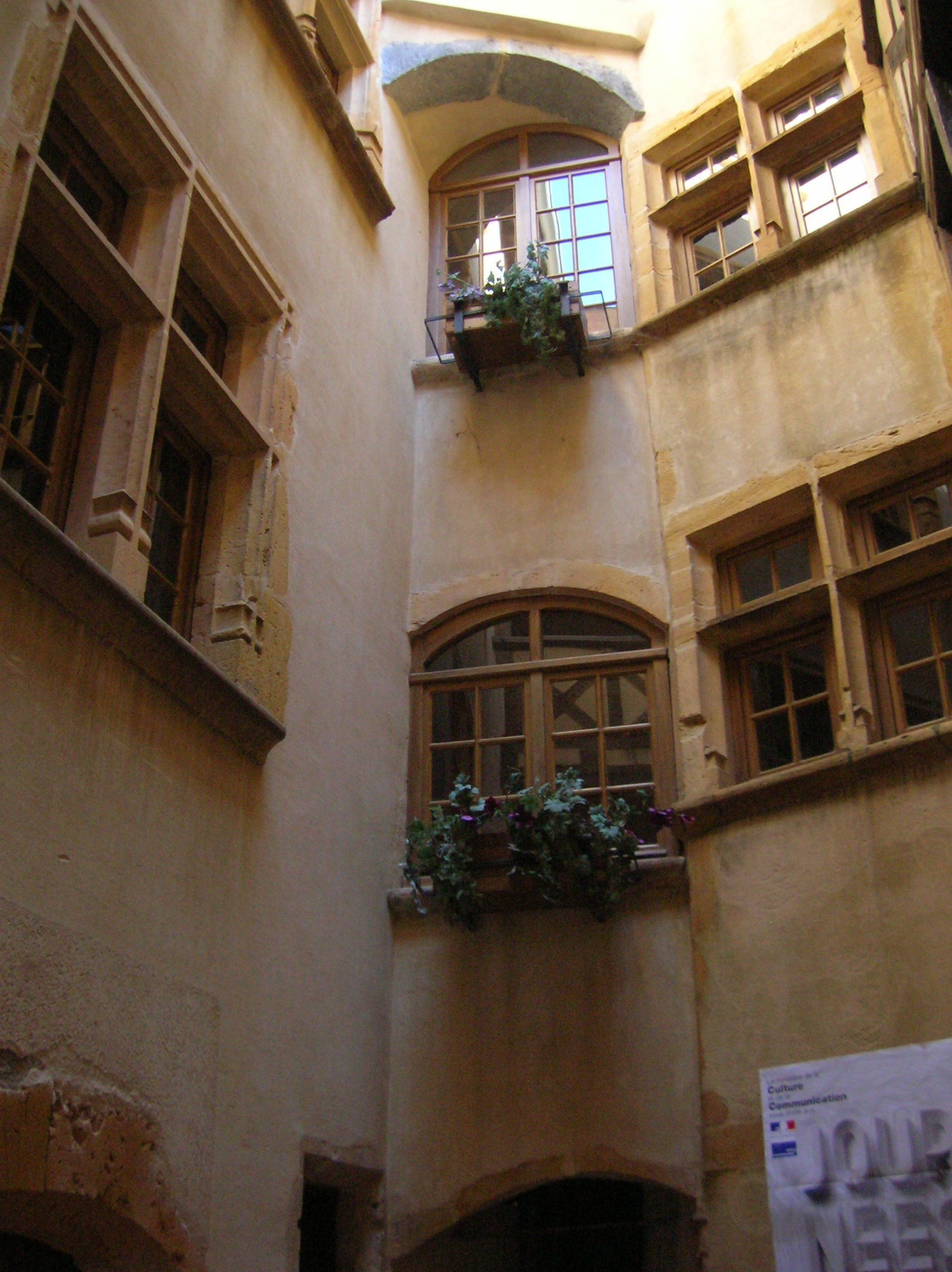 Maison à pans de bois de Beaujeu, Rhone, Rhone-Alpes, France. .